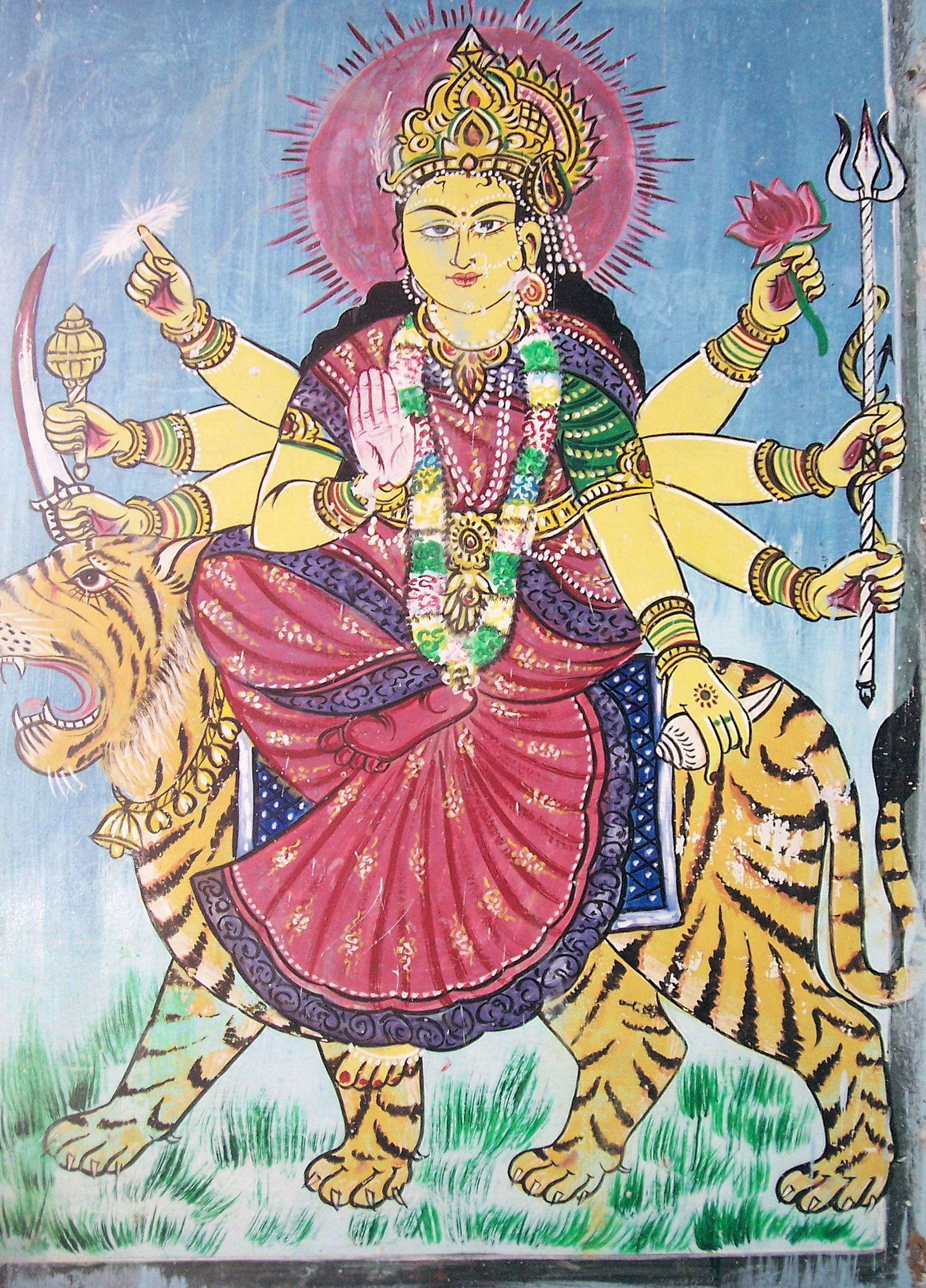 Godess Durga graffiti